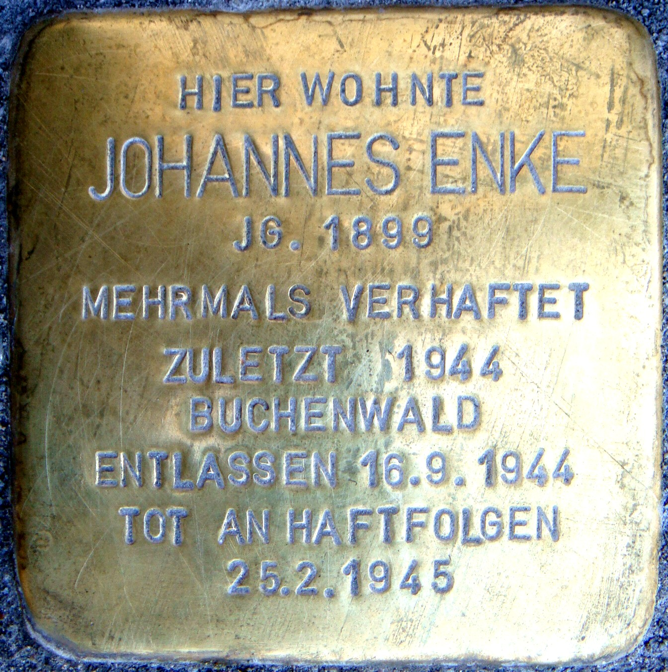 Stolperstein für Johannes Enke in Buttstädt